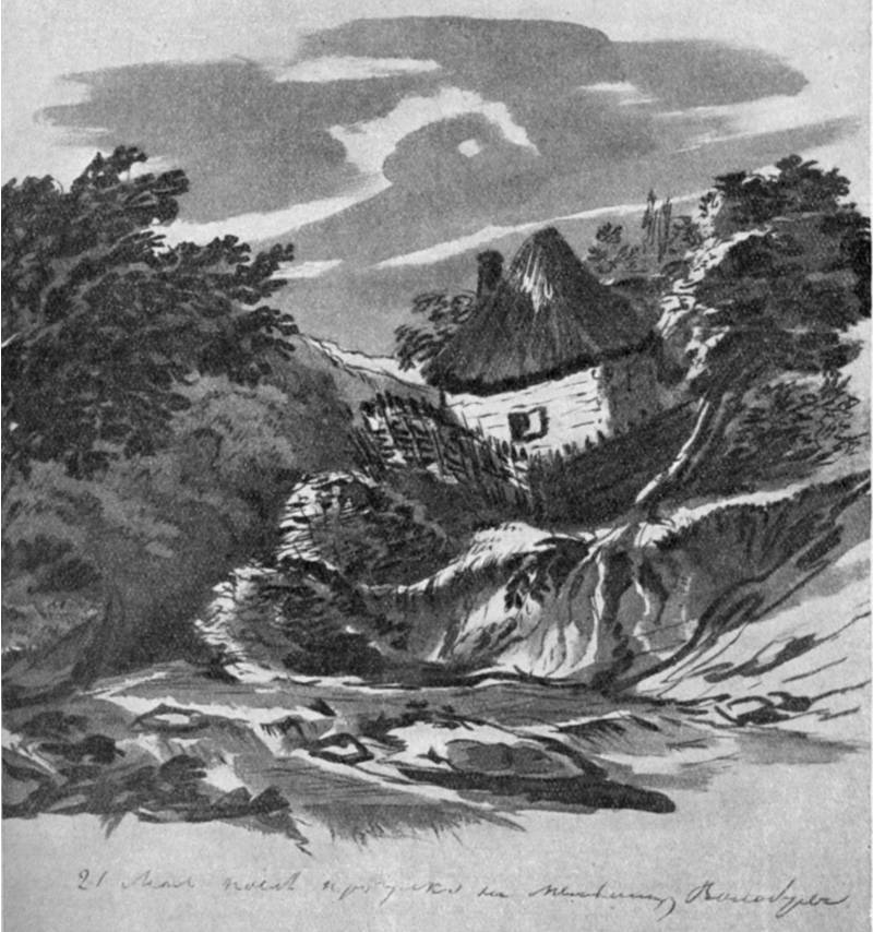 Второй лист автографа-посвящения к поэме "Демон" с рисунком Лермонтова